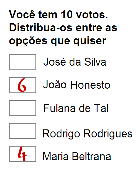 Exemplo de cÃ©dula usada em votaÃ§Ã£o cumulativa. Adaptado de pt::en:Image:Cumulative ballot.svg.